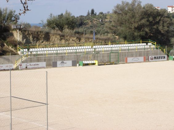 Mintilogli Groud Patra GreeceΔημοτικό γήπεδο Μιντιλογλίου στον Δήμο Βραχνέικων.